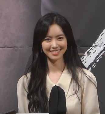 12일 오후 서울시 강남구 논현동 임피리얼팰리스서울에서 TV CHOSUN 특별기획 드라마 '간택-여인들의 전쟁' 제작발표회가 열려 배우 진세연 김민규 도상우 이열음 이시언이 참석해 기자들의 질문에 답변하고 있다.